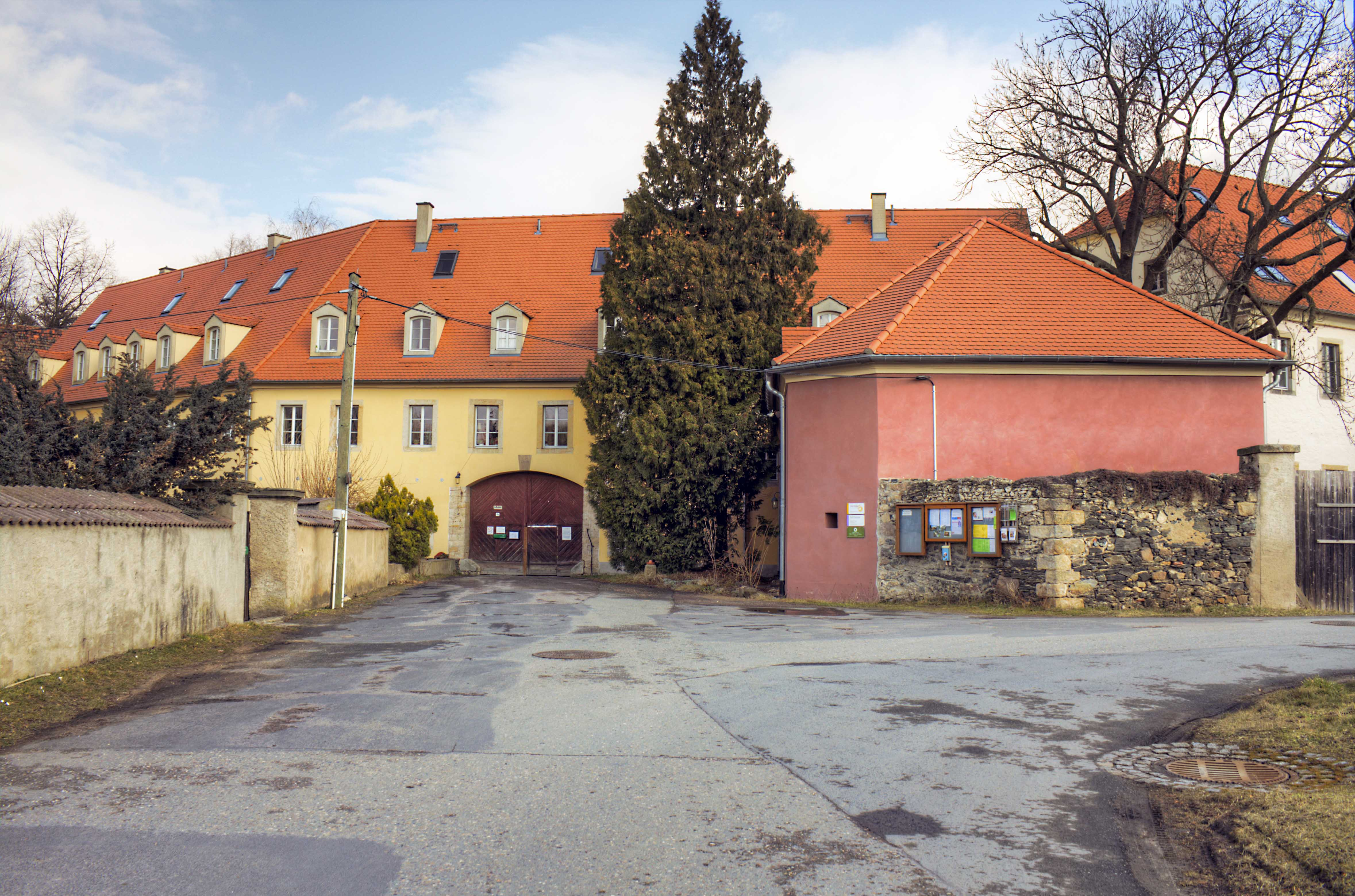 Torhaus mit angefügtem Wächterhaus am Schloss Jahnishausen, Jahnatalstraße 4 in Riesa Stt. Jahnishausen